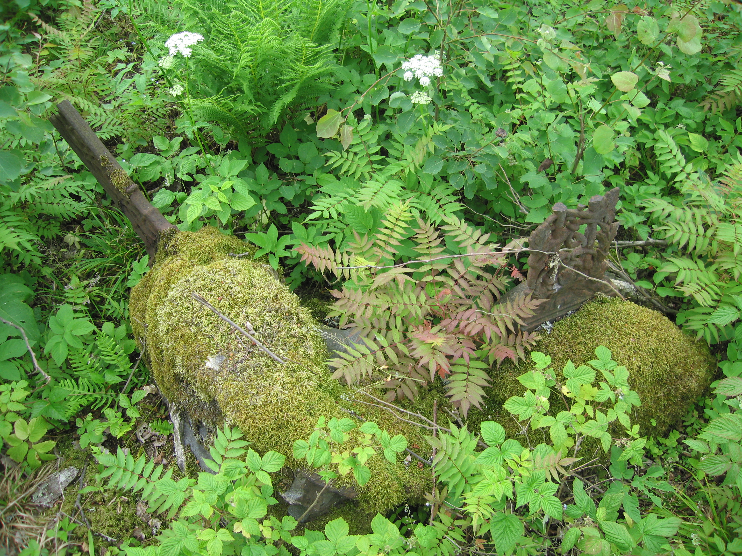 Hauatähised kalmistul.Foto: Robert Treufeldt, 23. juuni 2015